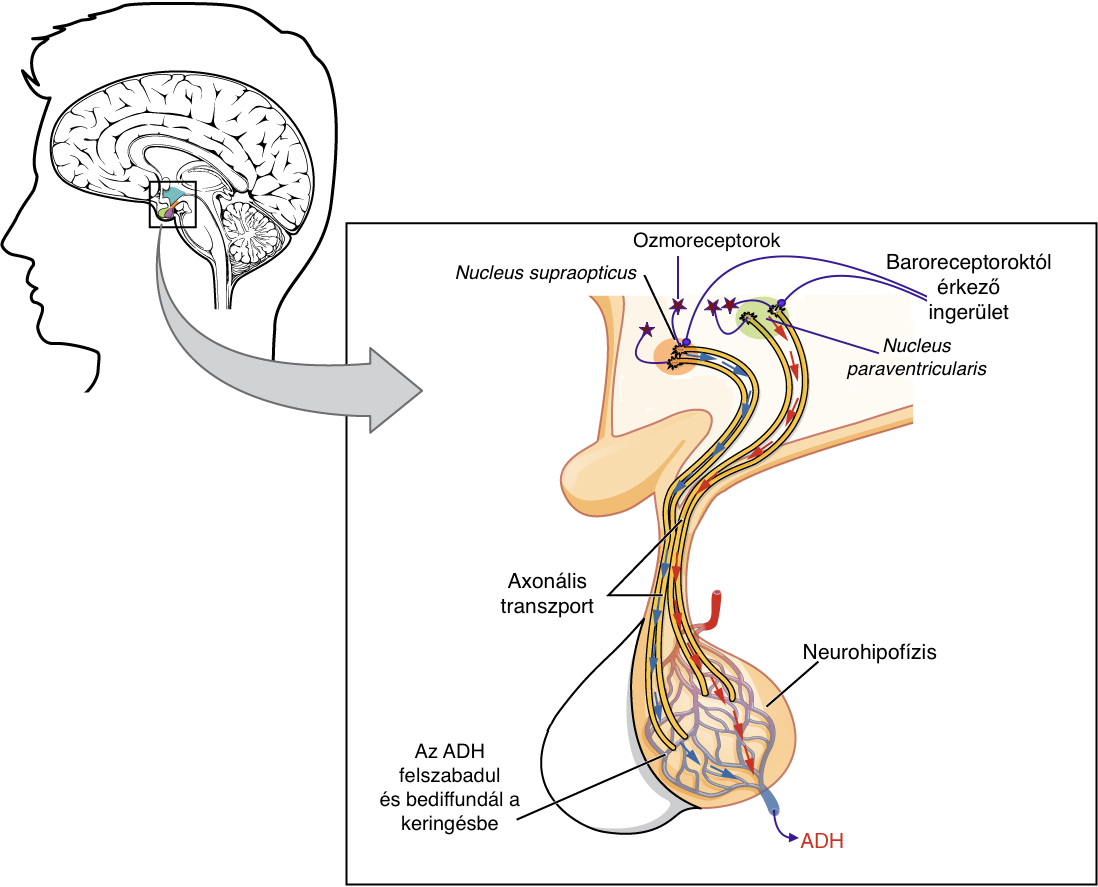 Magnocelluláris neuronokban termelt ADH diffúziója a keringésbe